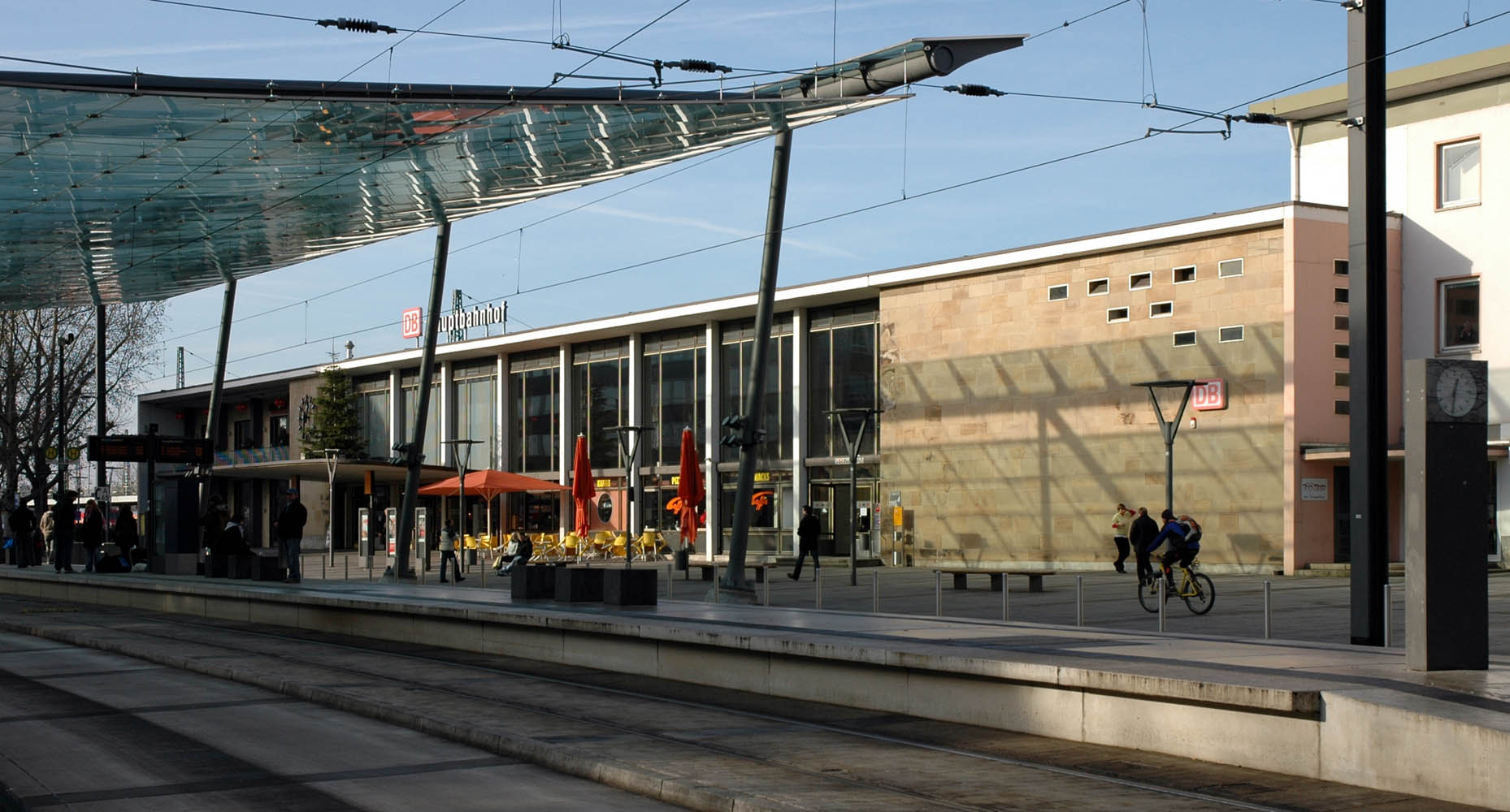 Empfangsgebäude des Heilbronner Hauptbahnhofs, Ansicht von Osten.